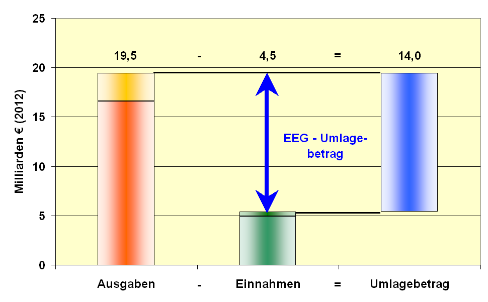 Umlagemechnismus des EEG: Differenz zwischen Ausgaben und Einnahmen ergibt den Umlagebetrag, der auf die Stromkunden verteilt wird